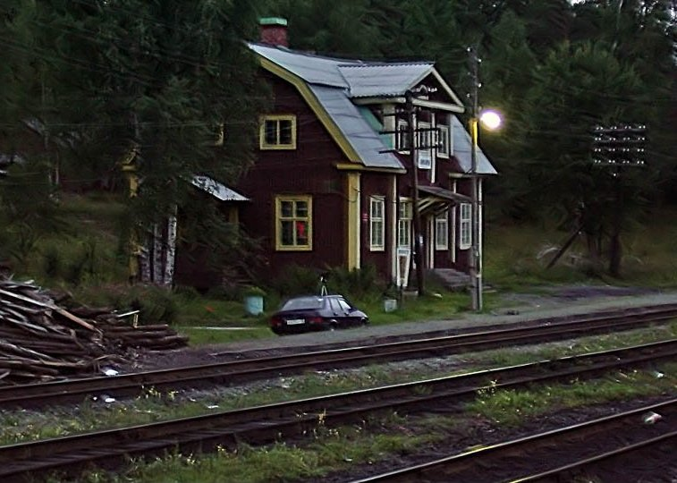 Янисъярви